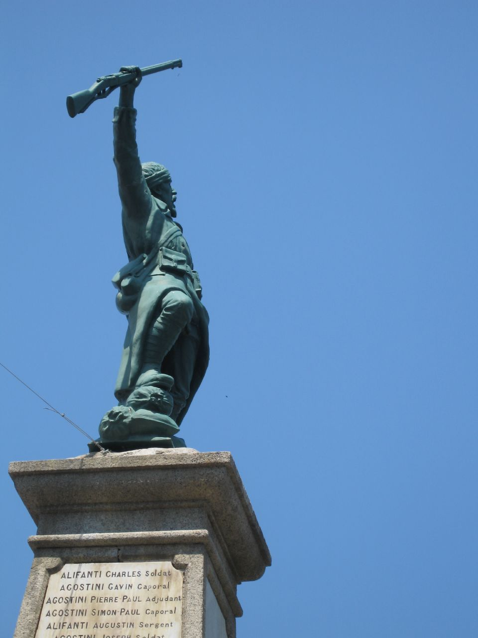 Zonza (Corse-du-Sud, France) - Monument aux Morts.